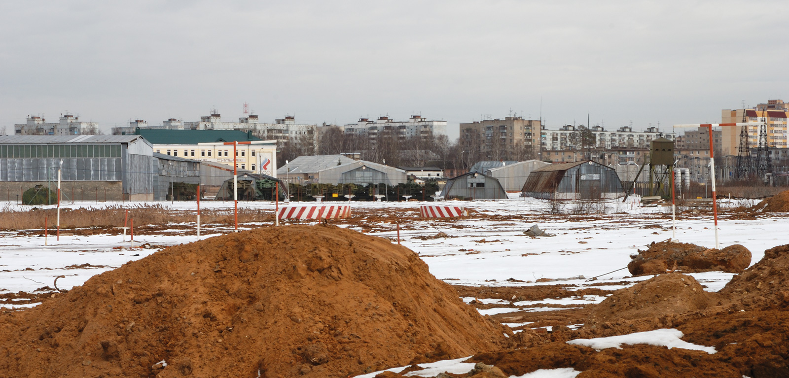 Nakhabino